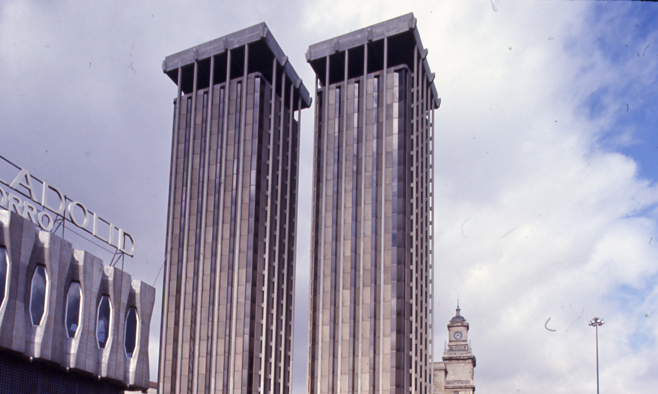 Servizio fotografico : Madrid, 1980 / Paolo Monti. - Foglio: 1, Fotogrammi complessivi: 20/20 : Diapositiva, sviluppo cromogeno/ pellicola ; 35 mm. - ((Iscrizione manoscritta su una striscia di cartoncino bianco: "Spagna/ Madrid" all'interno del contenitore. - Fonte: Rubrica di Paolo Monti: Diapositive 24x36mm (1948-1982), presso Archivio Paolo Monti. Rubrica con elenco soggetti e numeri di inventario (da 1 a 1000) corrispondenti ai fogli a tasche in pvc in cui sono contenute le diapositive.